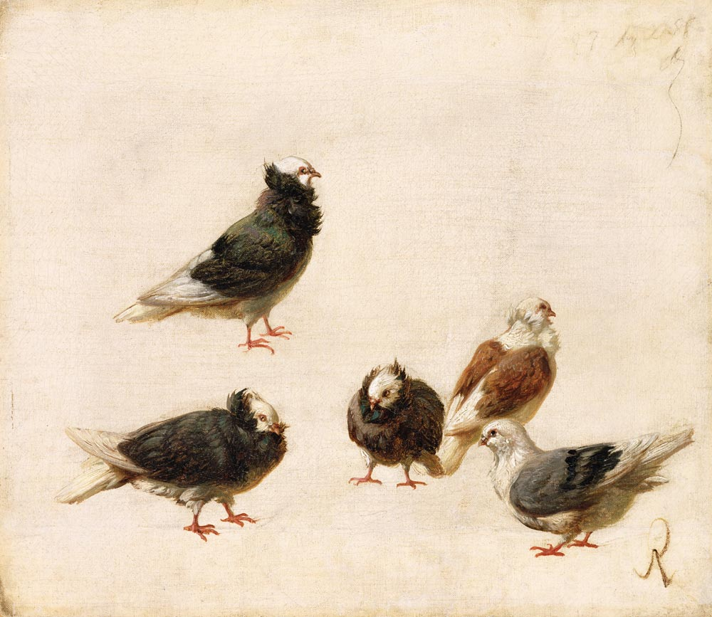 Doves